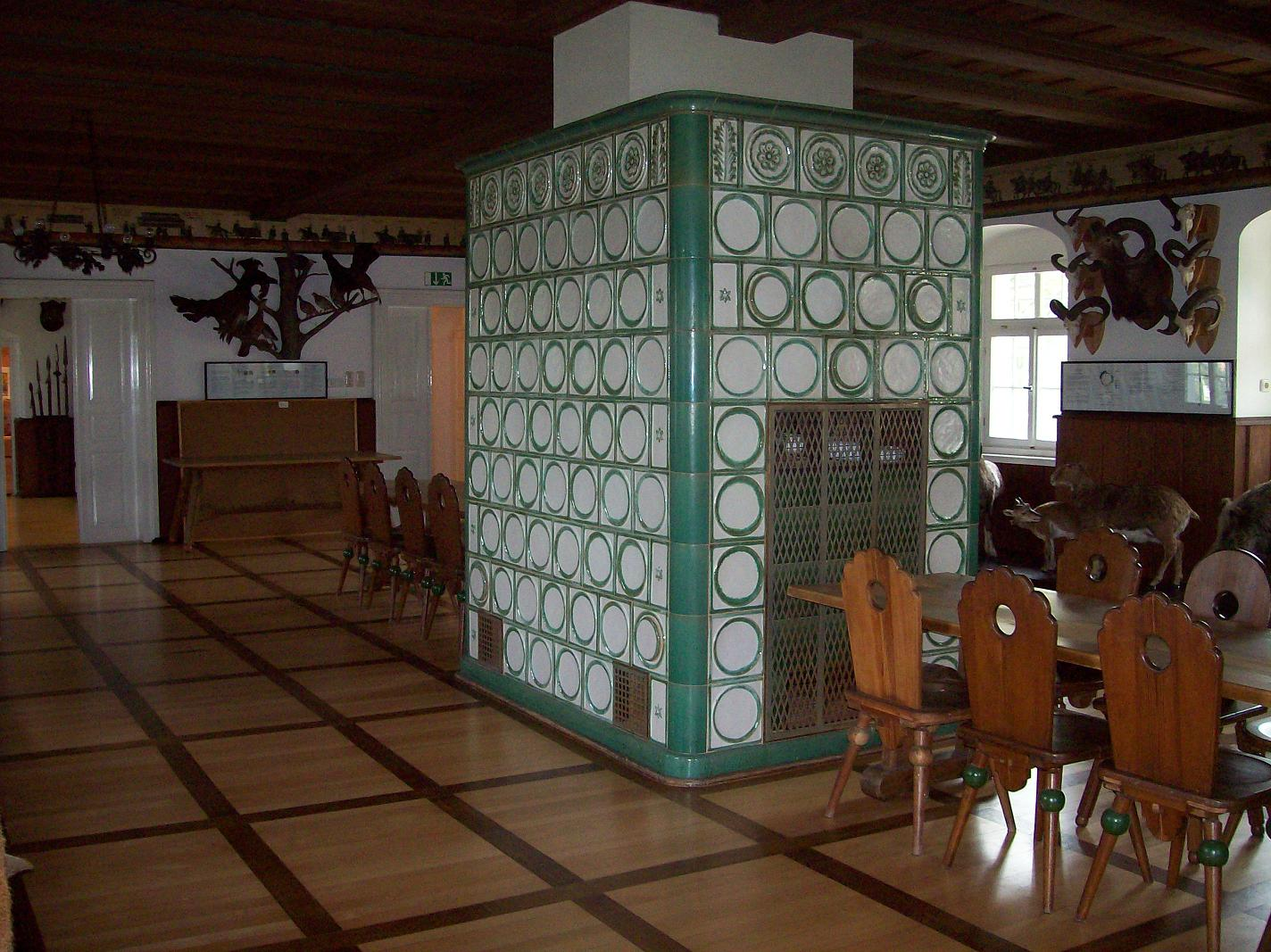 Jagdsaal im Schloss Grillenburg